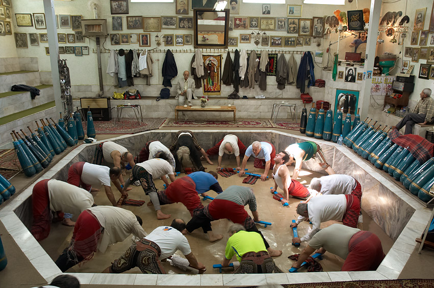 Zurkhaneh Ayatollah Taleghani in Tehran.